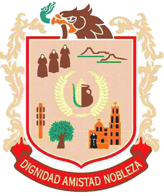 ESCUDO MUNICIPAL